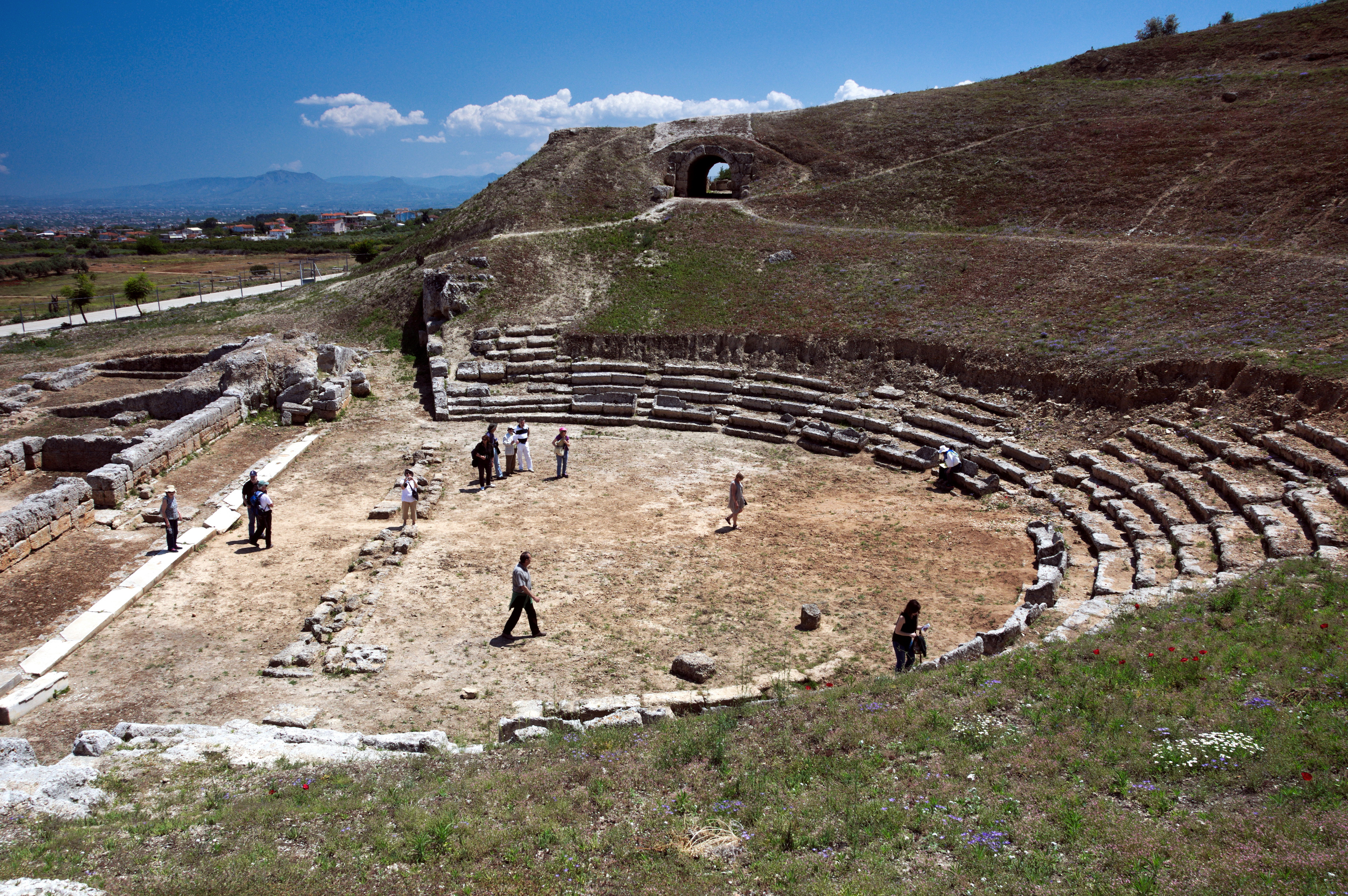 Θέατρο Σικυώνος, Νοτιοανατολική πλευρά«Θέατρο Σικυώνος»